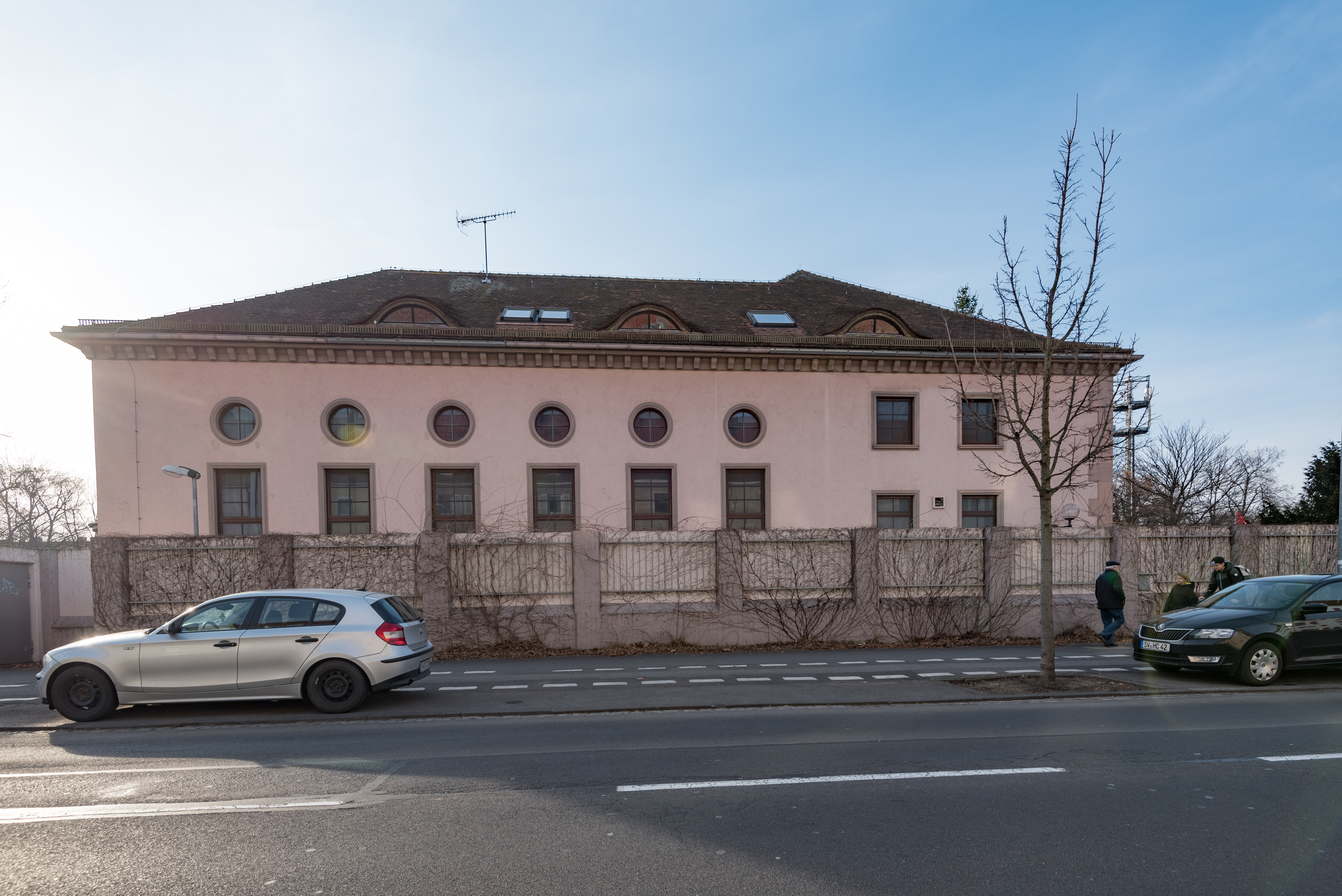 Schweinfurt, Richard-Wagner-Straße 31